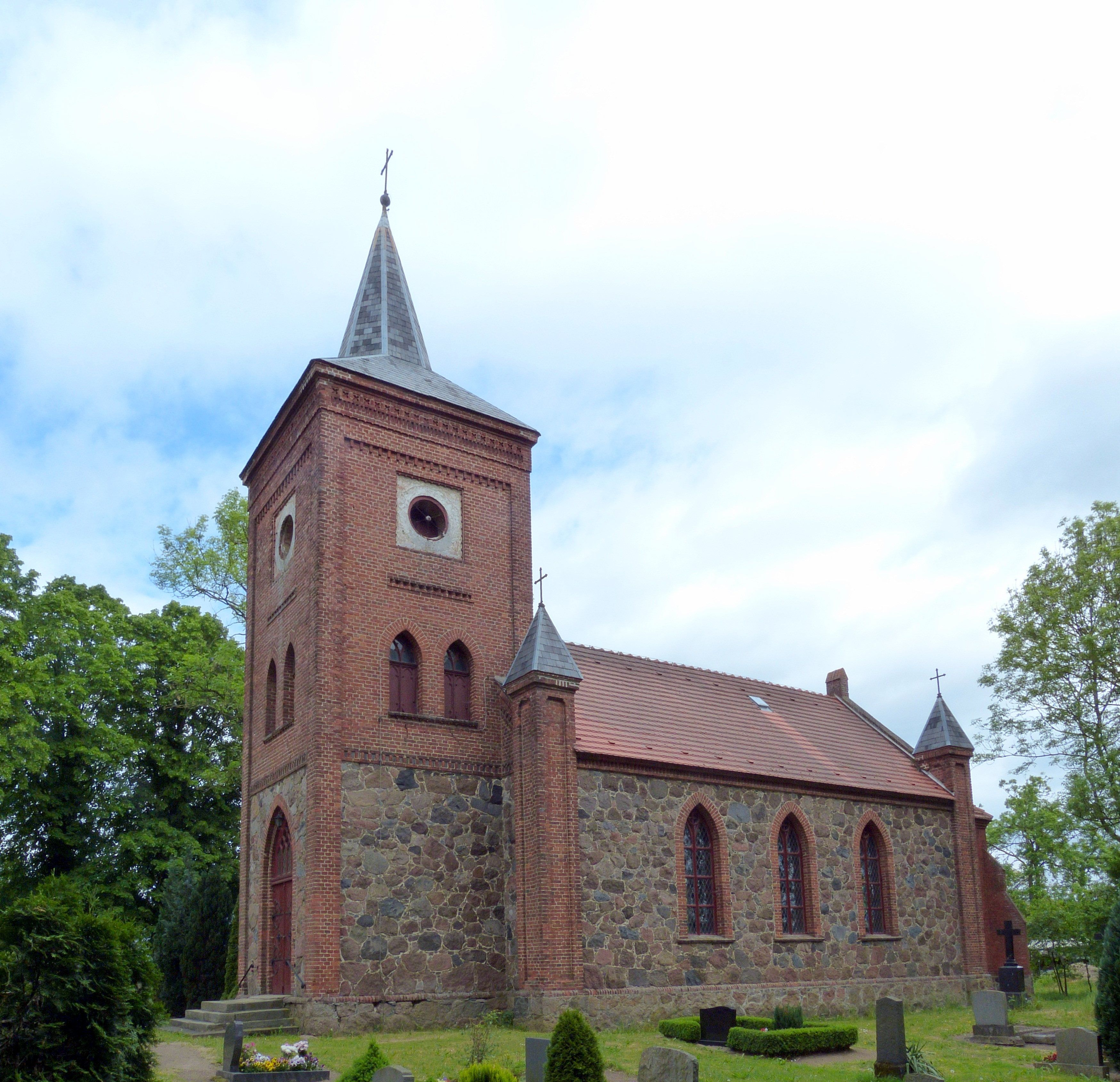 Kirche in Bretwisch, Südseite